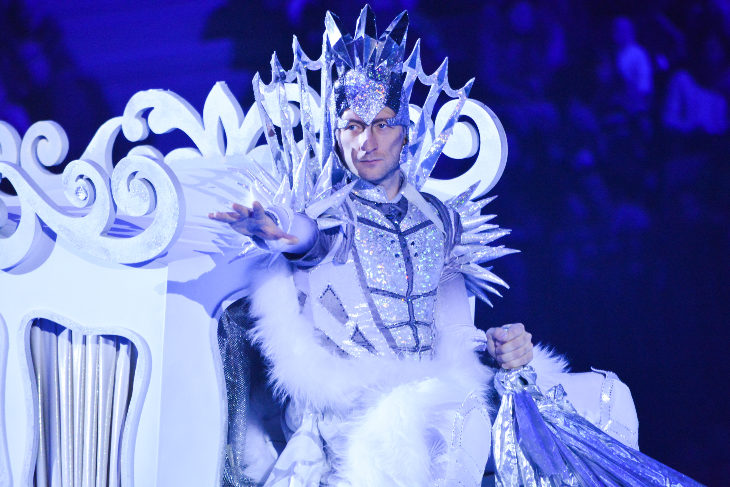 Евгений Плющенко. Ледовое шоу-сказка «Снежный Король» (Санкт-Петербург)